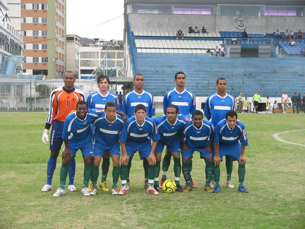 Equipe profissional do Bréscia em 2007. Foto de Paulo Roberto Rodrigues.